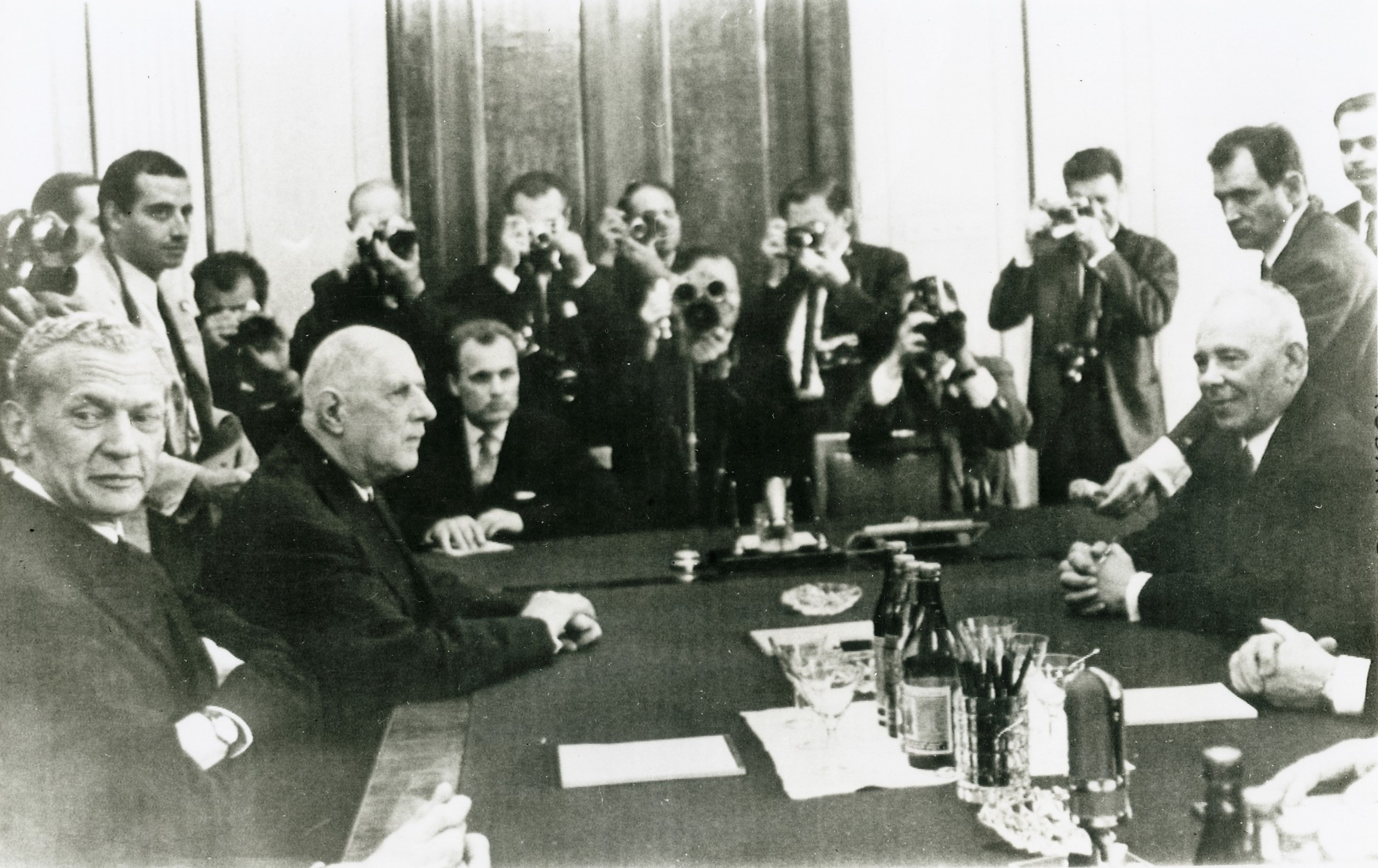 Fotografia do Fundo Correio da Manhã, sob a guarda do Arquivo Nacional.